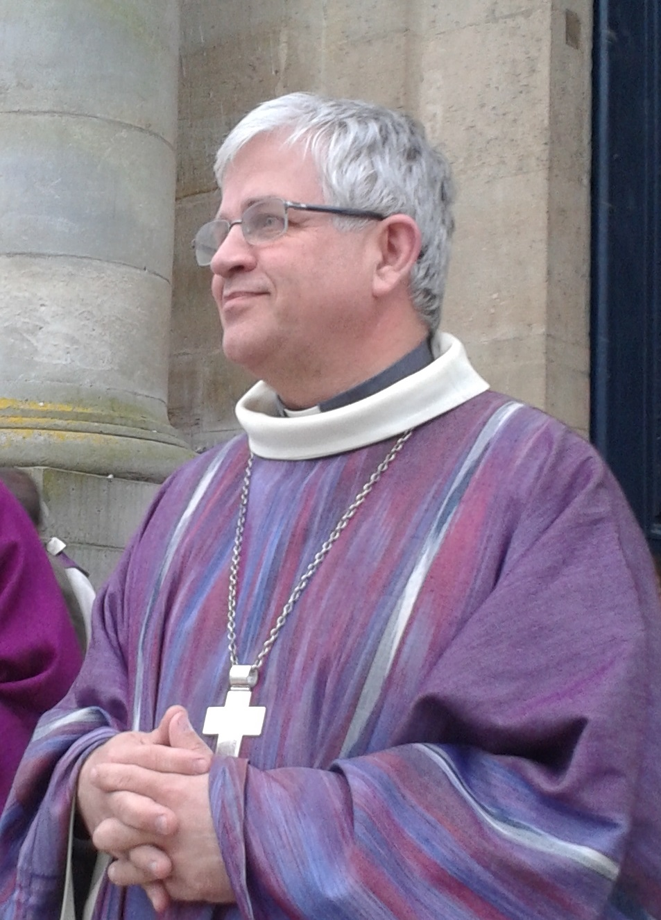 Profil de Mgr Leborgne lors de sa messe d'action de grâce à la cathédrale de Versailles avant de partir comme évêque pour le diocèse d'Amiens →This file has been extracted from another file: Mgr Aumonier et Mgr Leborgne2.jpg